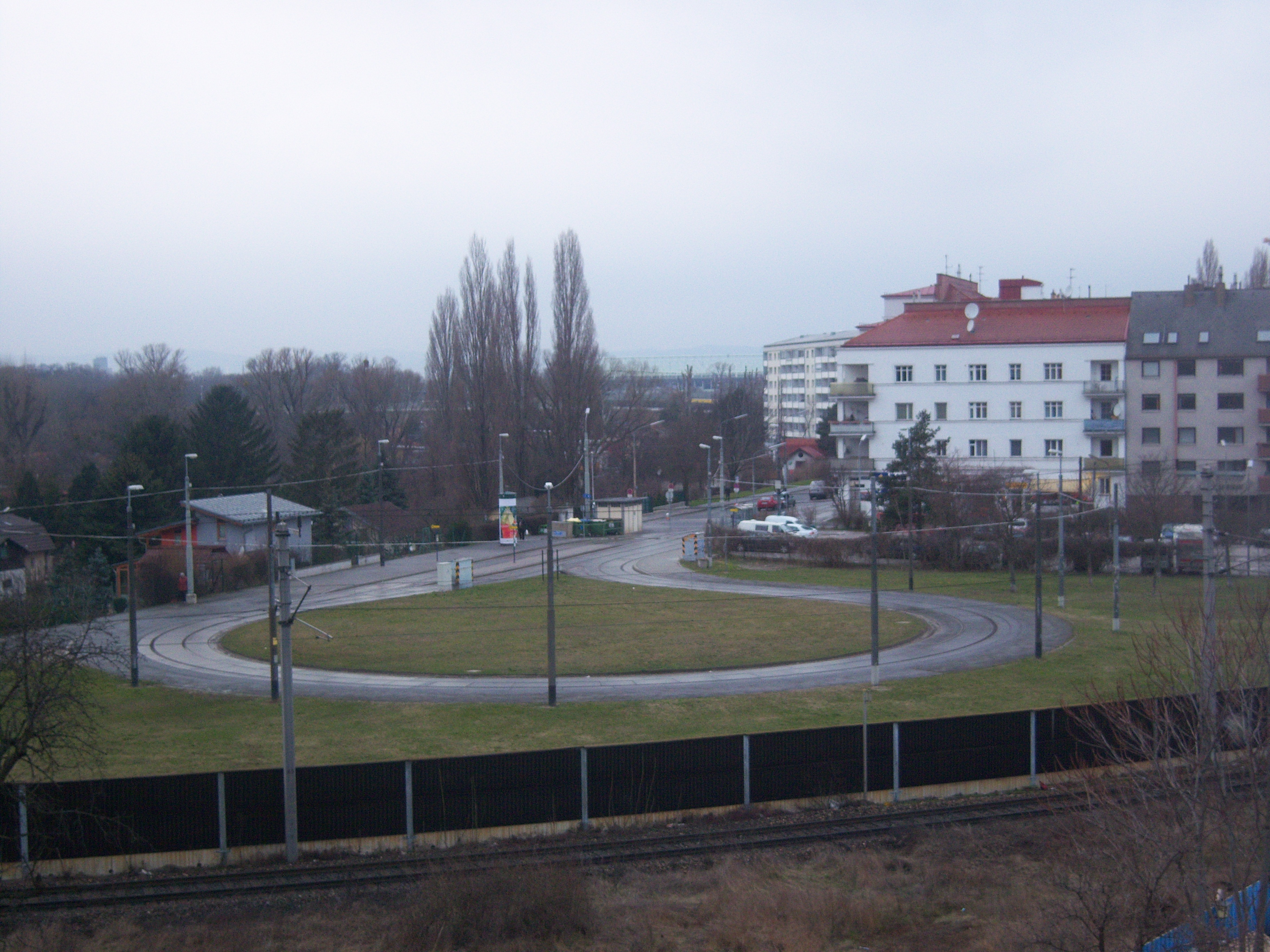 Schleife der eingestellten Straßenbahnlinie 21. Bahnhof Wien Praterkai